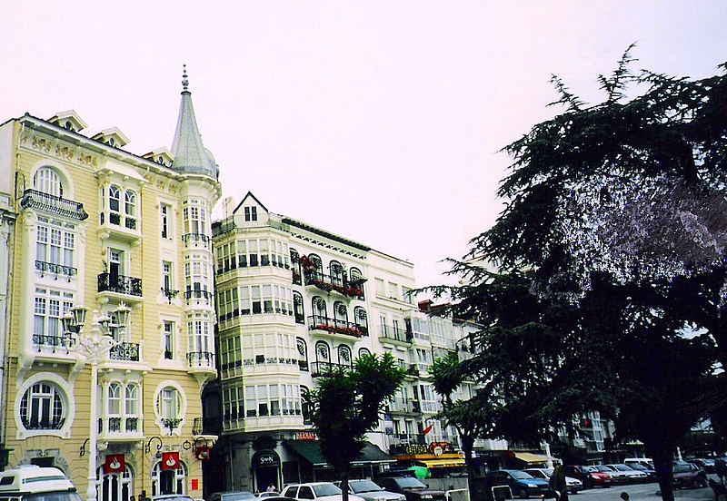 Castro Urdiales - Cases al passeig marítim.